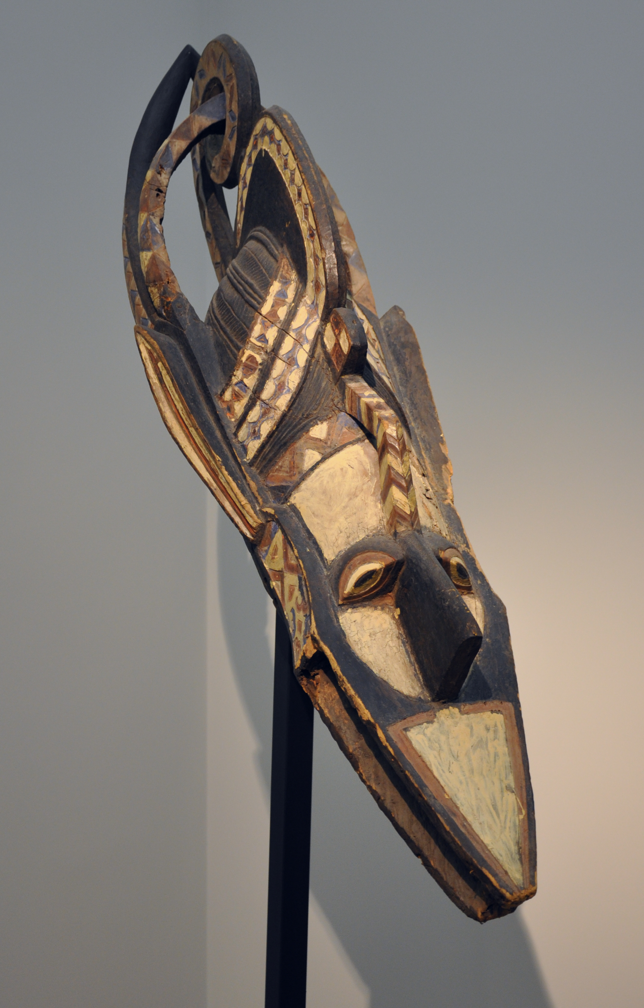 Aufsatzmaske banda, Guinea, Werkstatt der Nalu- oder Baga-Region, frühes 20. Jh.; Holz (bemalt), Metall Museum Rietberg, Zürich; Inv. Nr. RAF 4